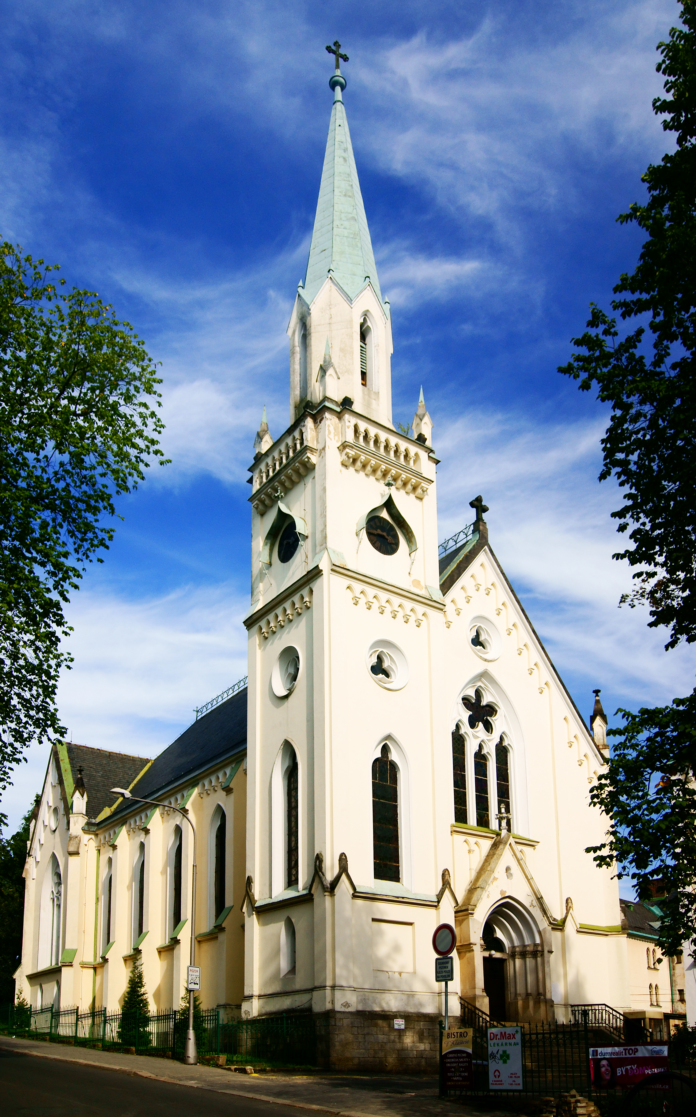 Novogotický pravoslavný kostel Božského Srdce Páně v Liberci.